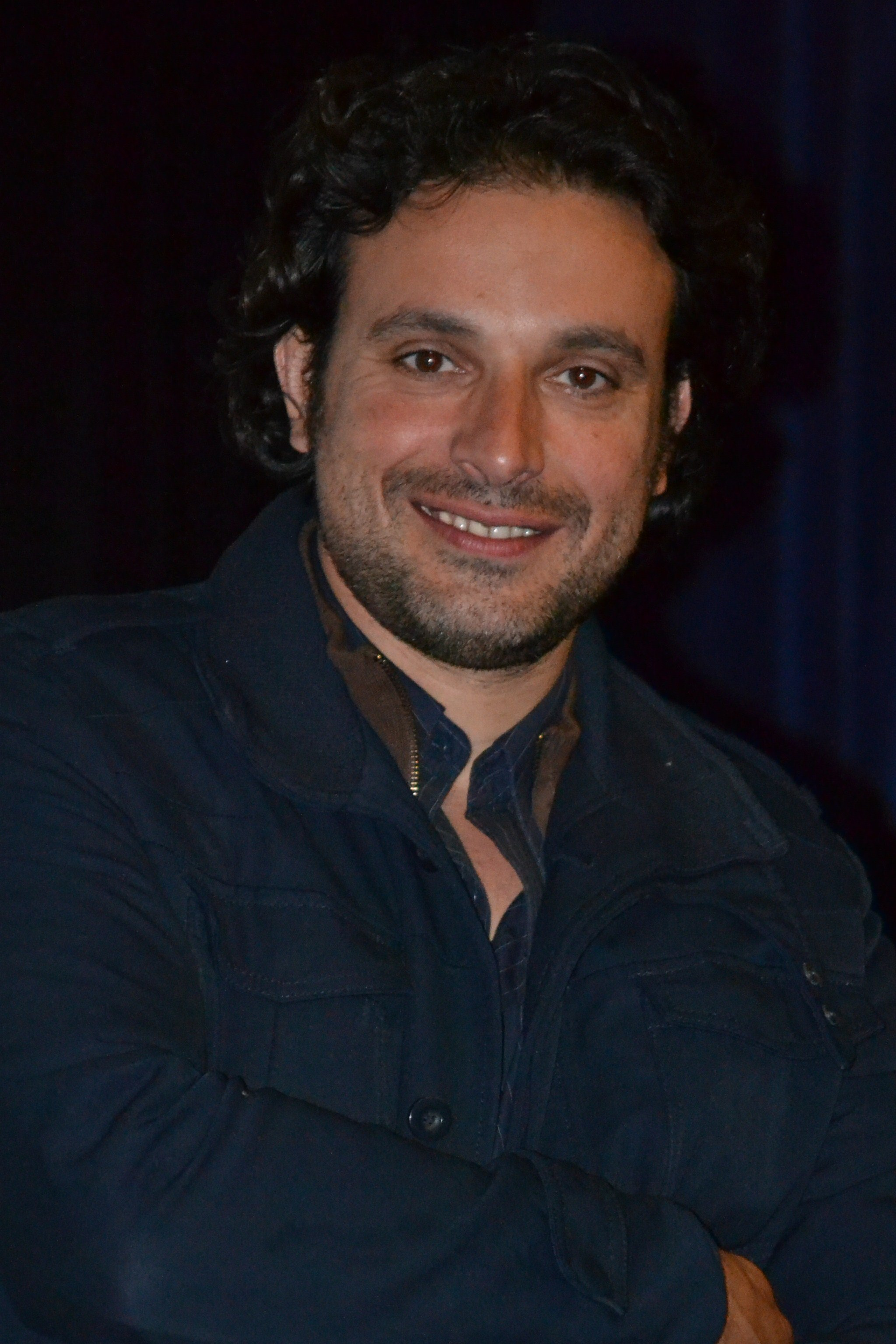 Bruno Salomone lors d'une rencontre cinéma à Cannes